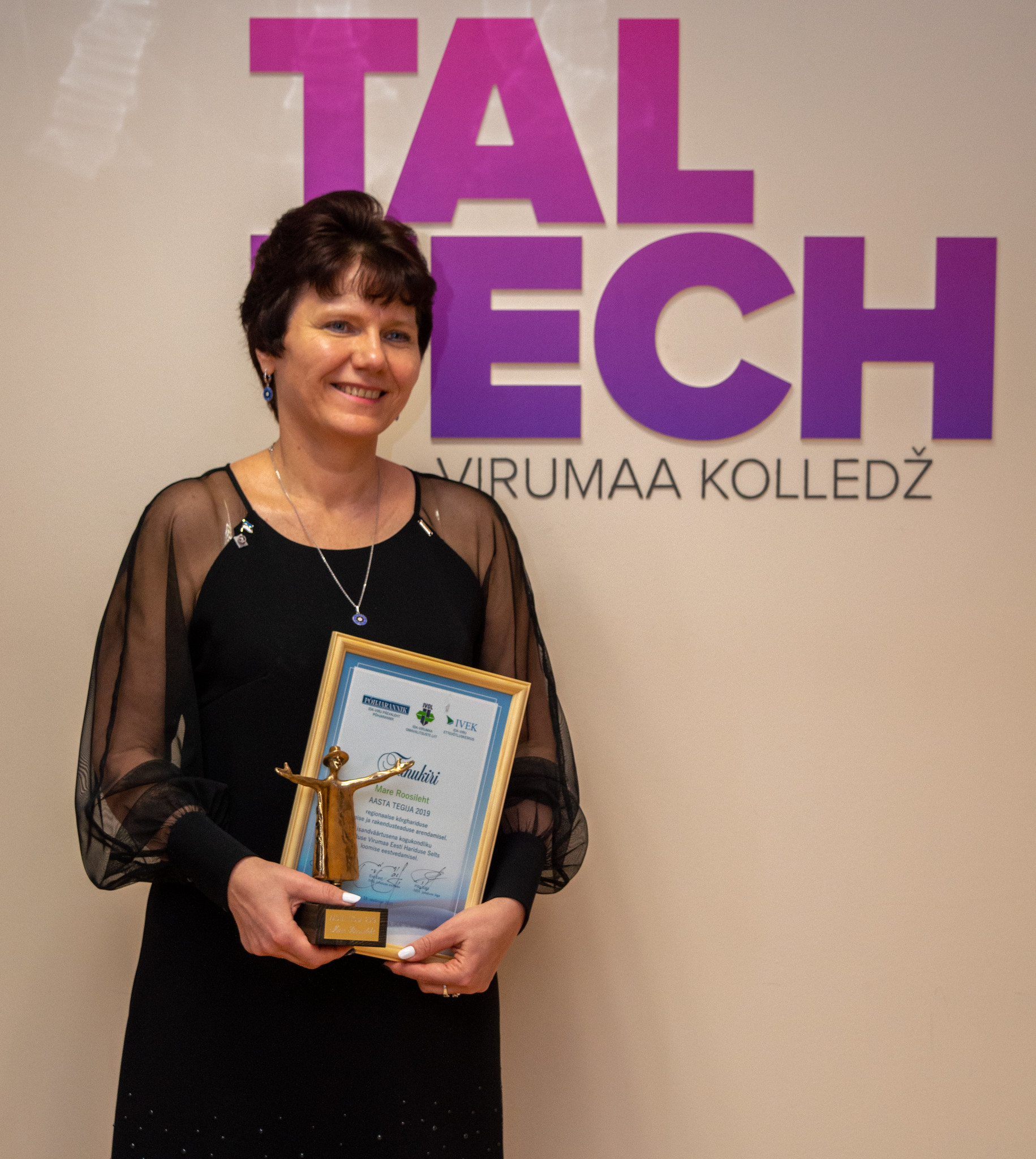 Ida-Virumaa aasta tegija 2019